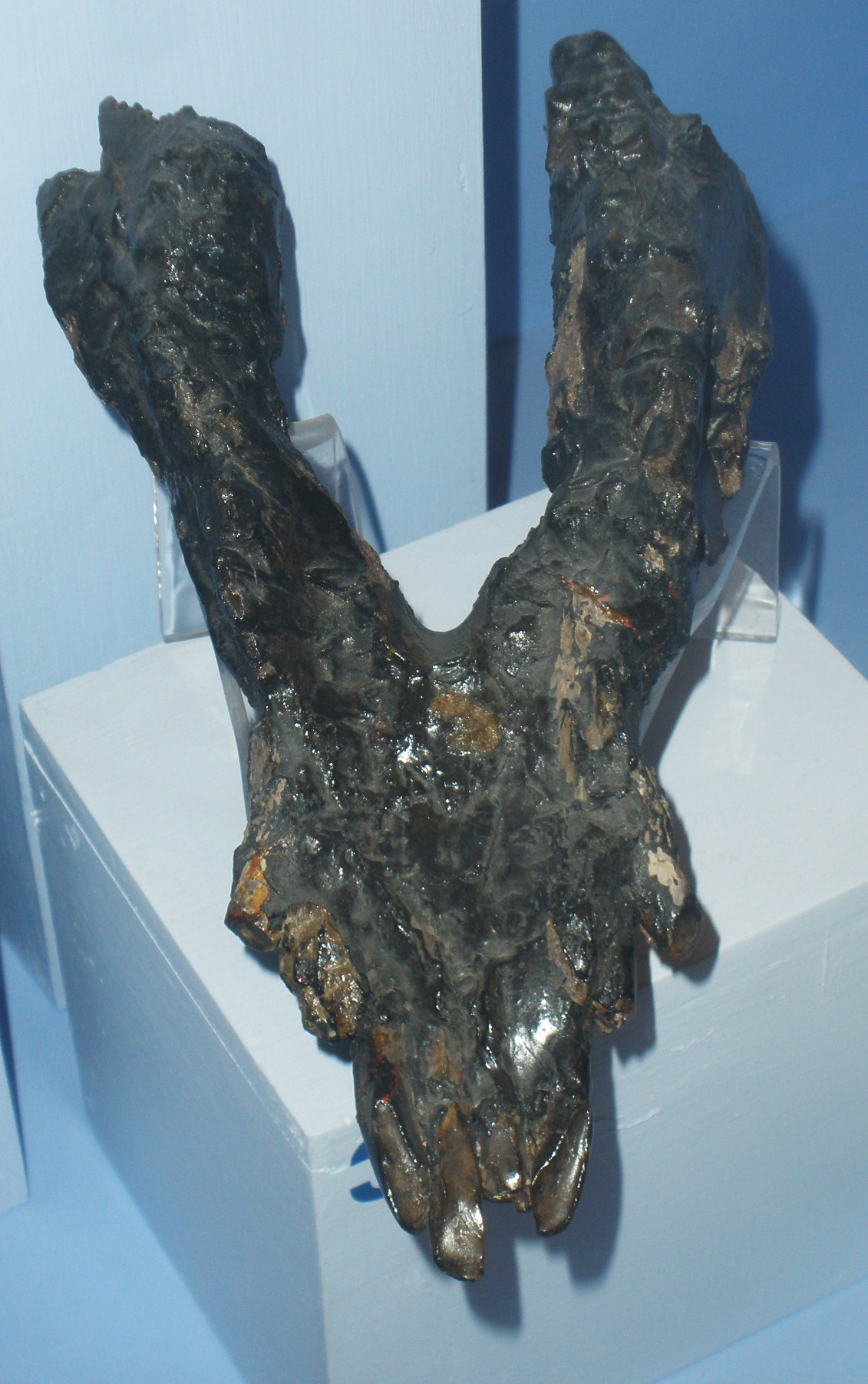 Fossil of Microstonyx, an extinct mammal- Took the picture at Museo di Paleontologia di Firenze